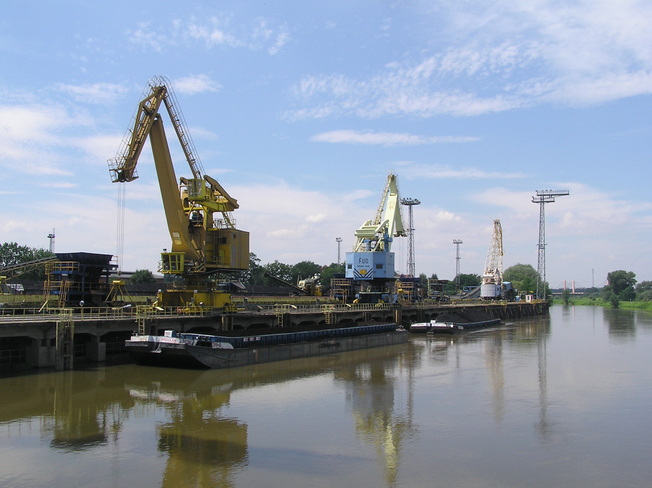 Wrocław, Kleczków, Odra - Kanał Miejski/Stara Odra, Przeładownia Elektrociepłowni Wrocław